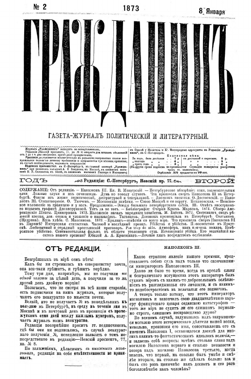 «Гражданин» газета-журнал, 1873, №2, 8 января.